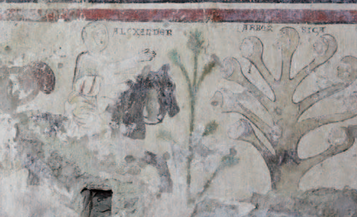 Alessandro Magno - L’incontro con gli alberi del Sole e della Luna - affresco sulla parete nord-ovest del donjon del castello di Quart